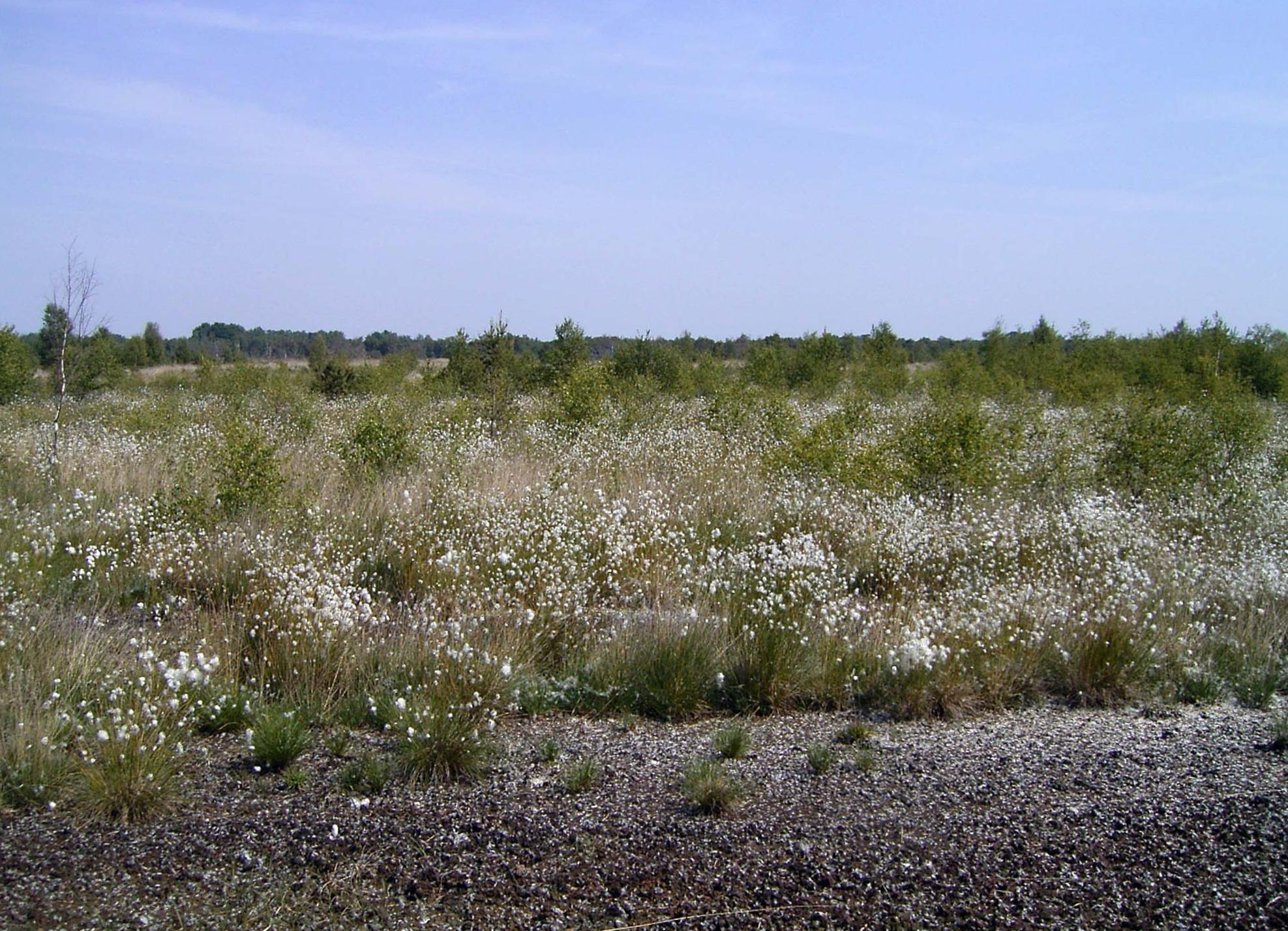 Scheiden-Wollgras (Eriophorum vaginatum), NSG Hahnenmoor (Niedersachsen).